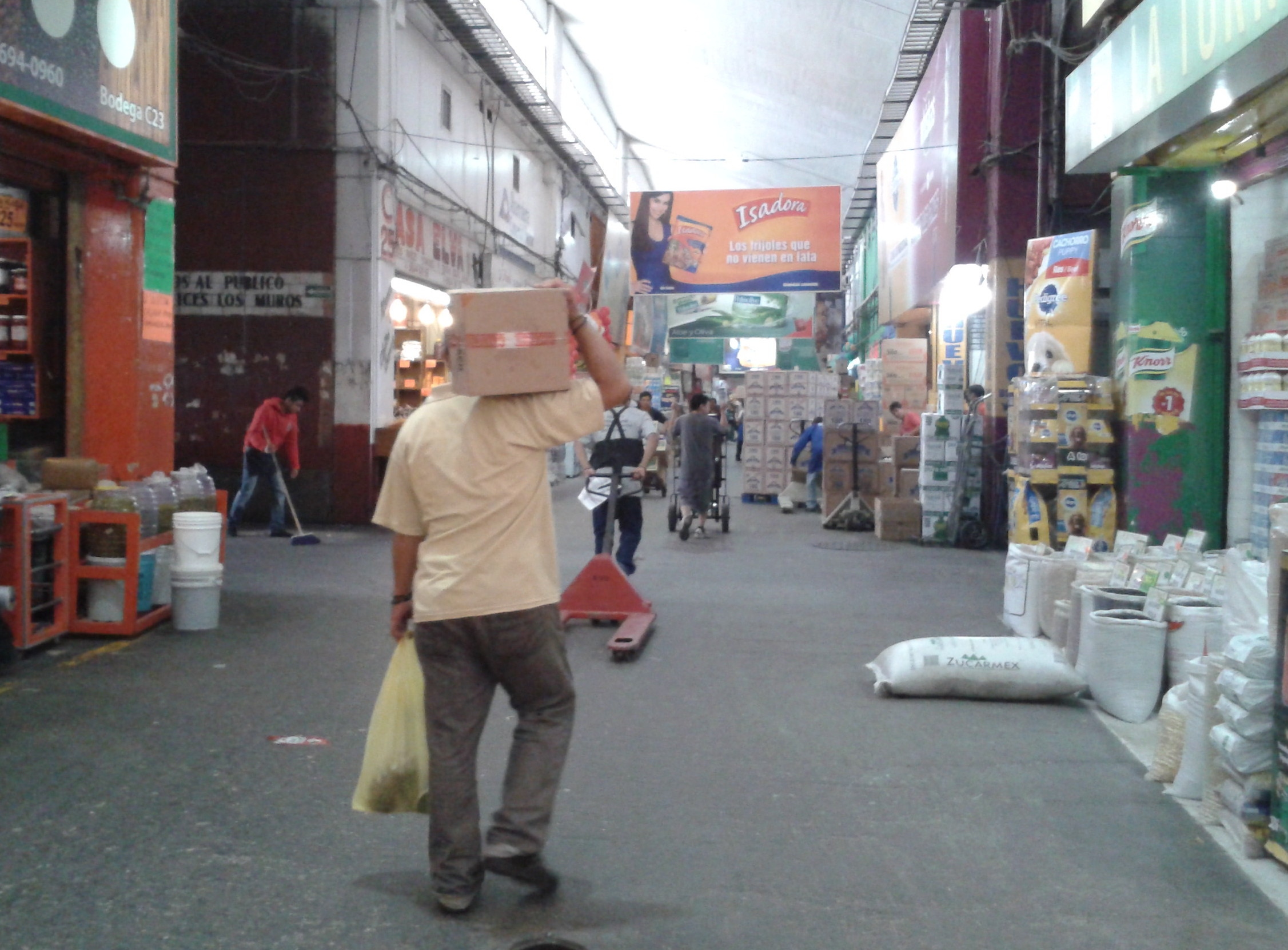 Vista del Pasillo C-D de la Central de Abasto de la ciudad de México en la zona de Abarrotes.